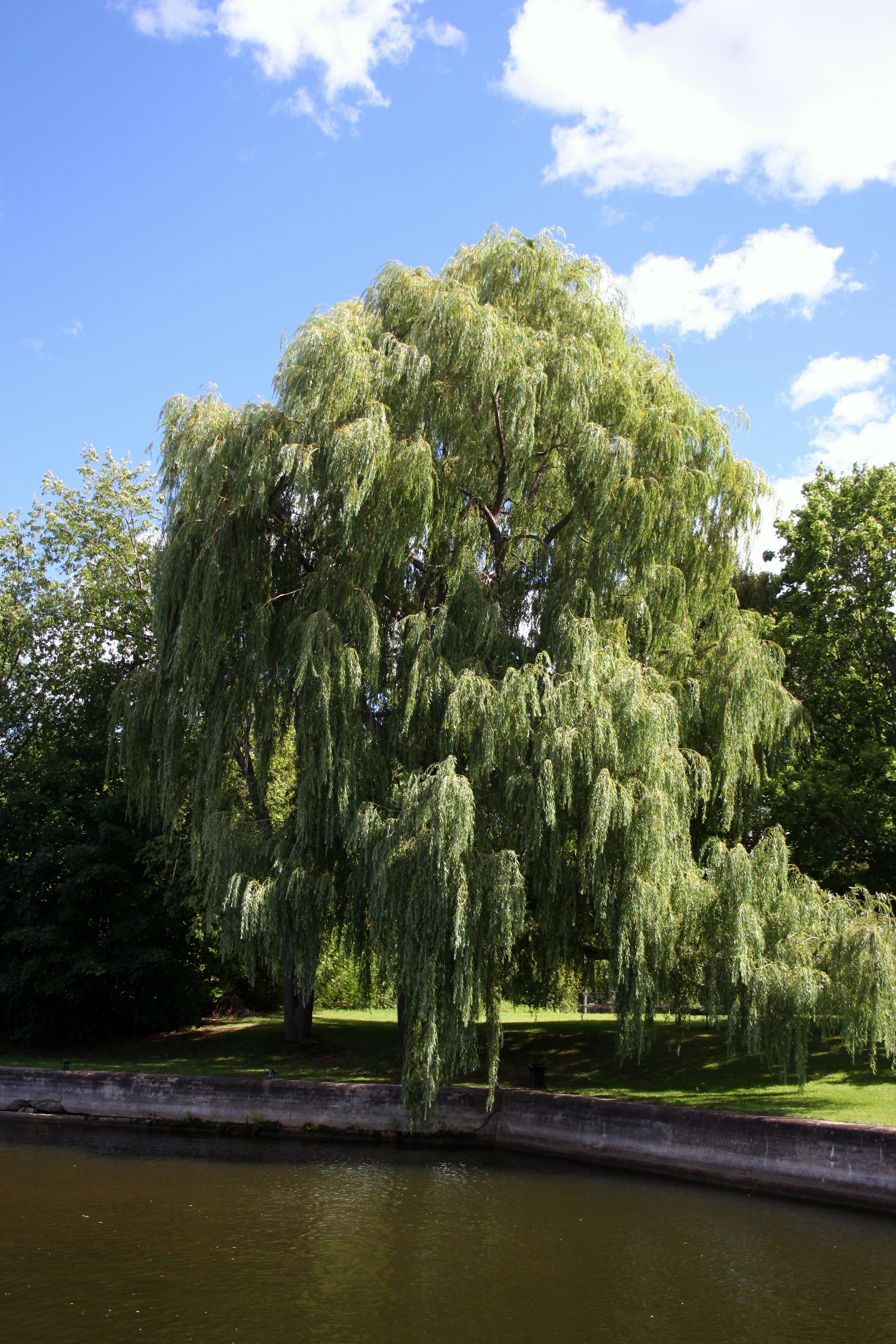 wierzba (może być aleja z wierzbami) English | Polski | +/−